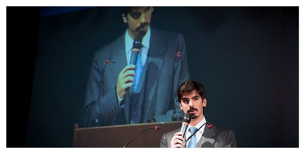 Leandro Viotto Romano disertando en Cumbre internacional de jóvenes líderes 2011